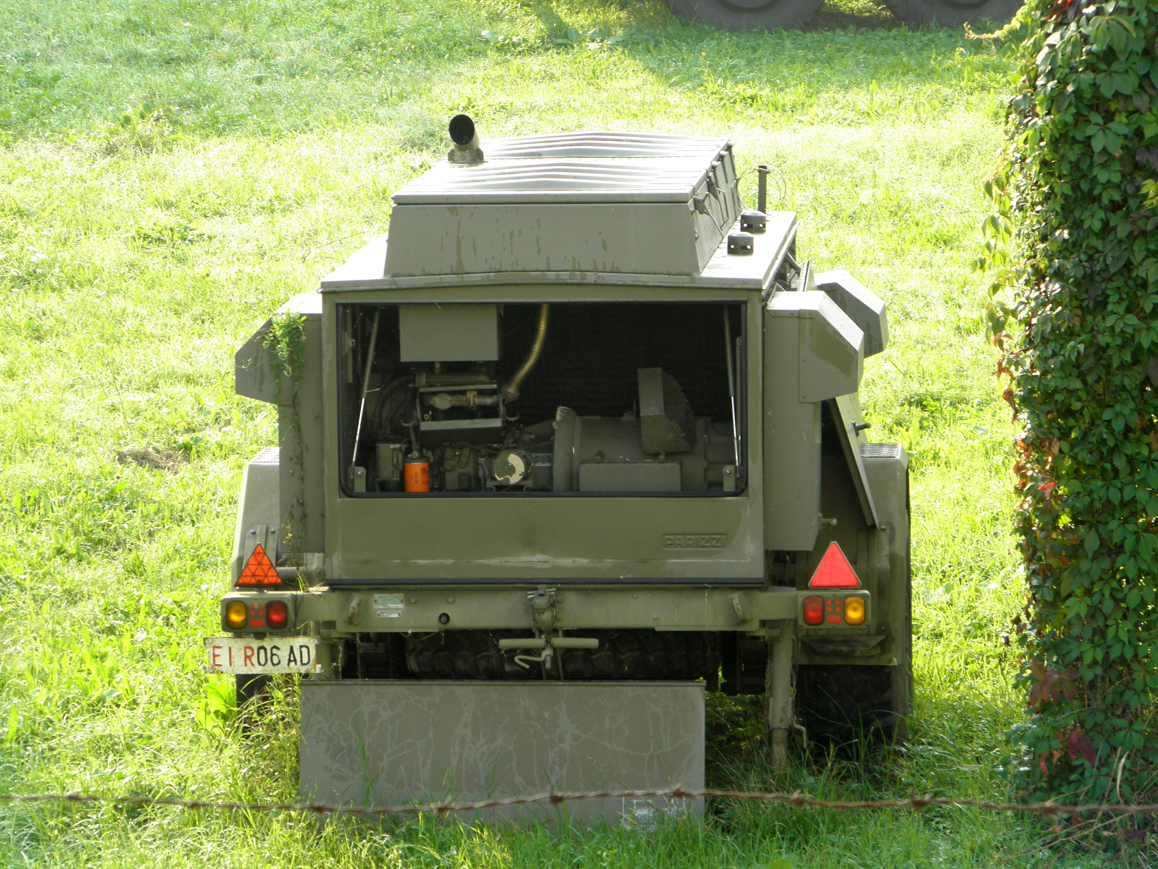 Stazione Energia (gruppo elettrogeno) Parizzi GE-9/765-3, Esercito Italiano.